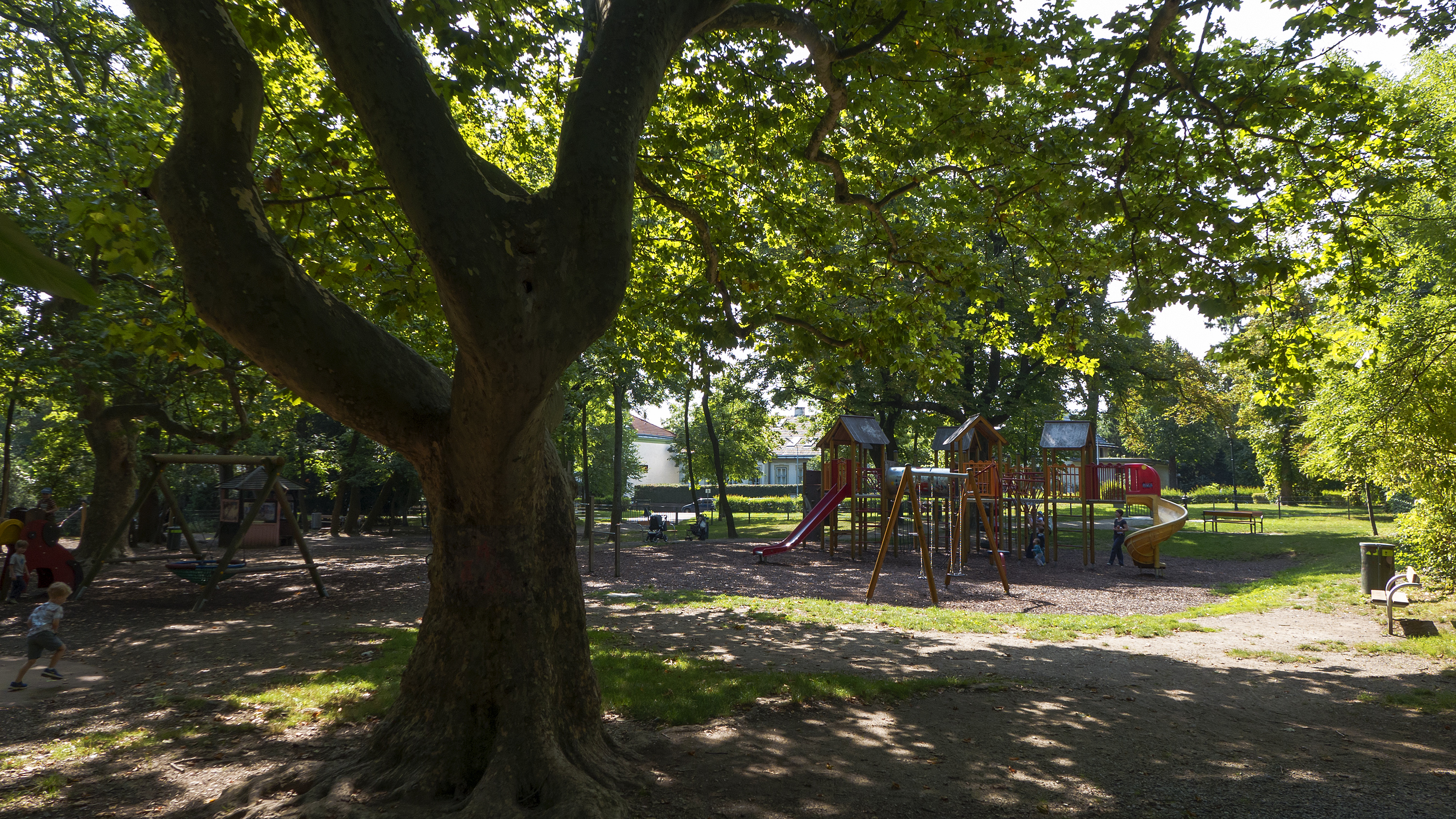 Ölzeltpark in Wien 23